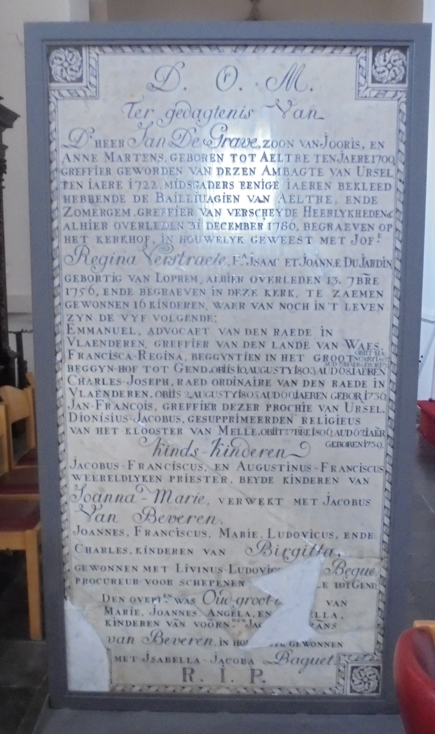 De grafsteen van griffier Jan de Graeve (1700-1786) en echtgenote Regina Verstraeten - Sint-Medarduskerk - Urseldorp - Ursel - Oost-Vlaanderen - België